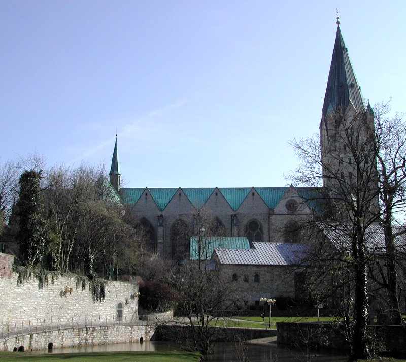 Paderborn, Deutschland: Nordseite des Paderborner Doms